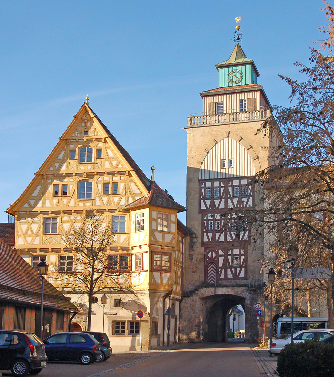 Wimpelinhaus und Oberes Tor in Markgröningen (2013)